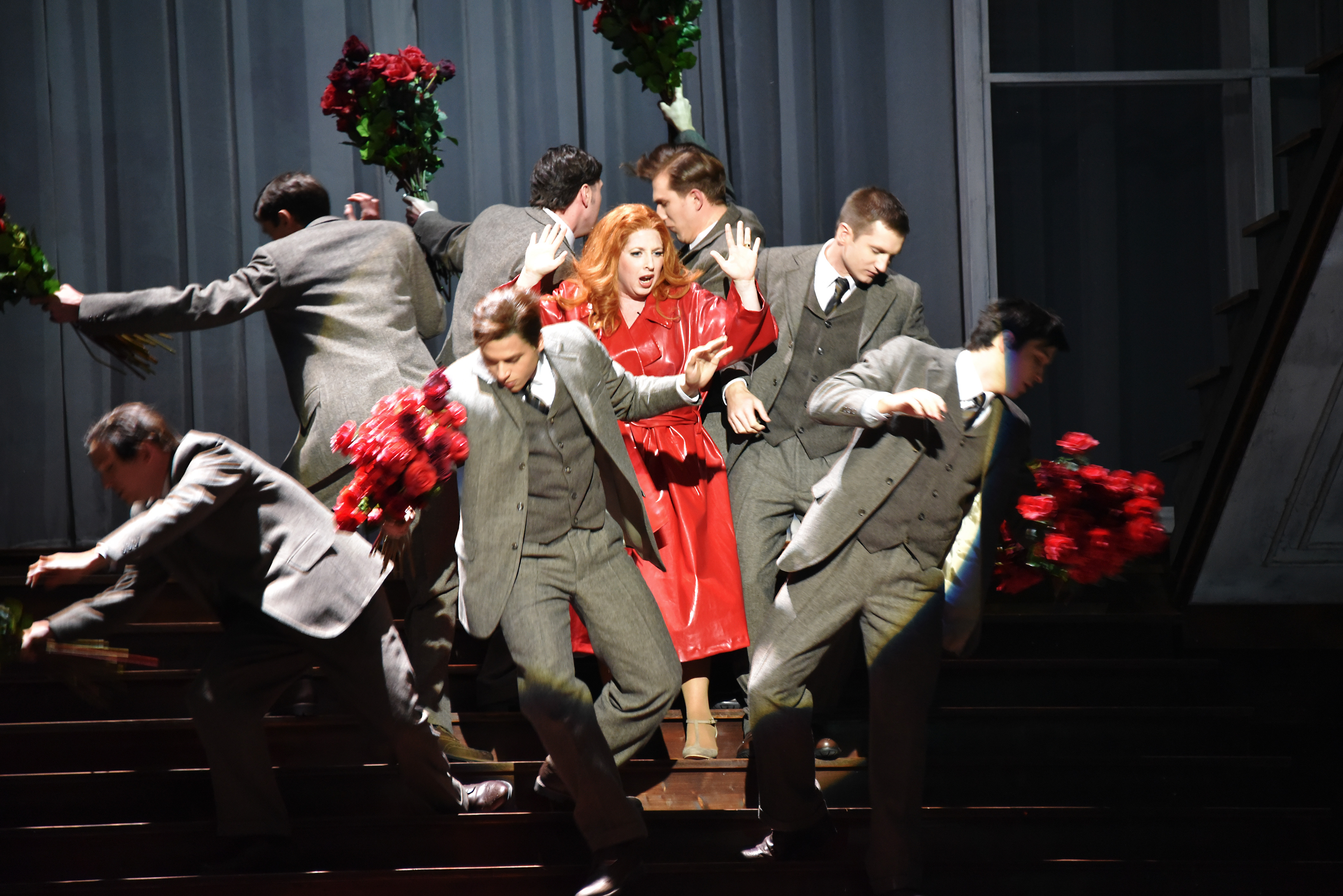 Graz Opera House, Oper Graz, Inszenierung: Johannes Erath